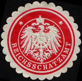 Sealing stamp Title: Reichsschatzamt Description: rot, weiß, geprägt Place: size: 4 cm